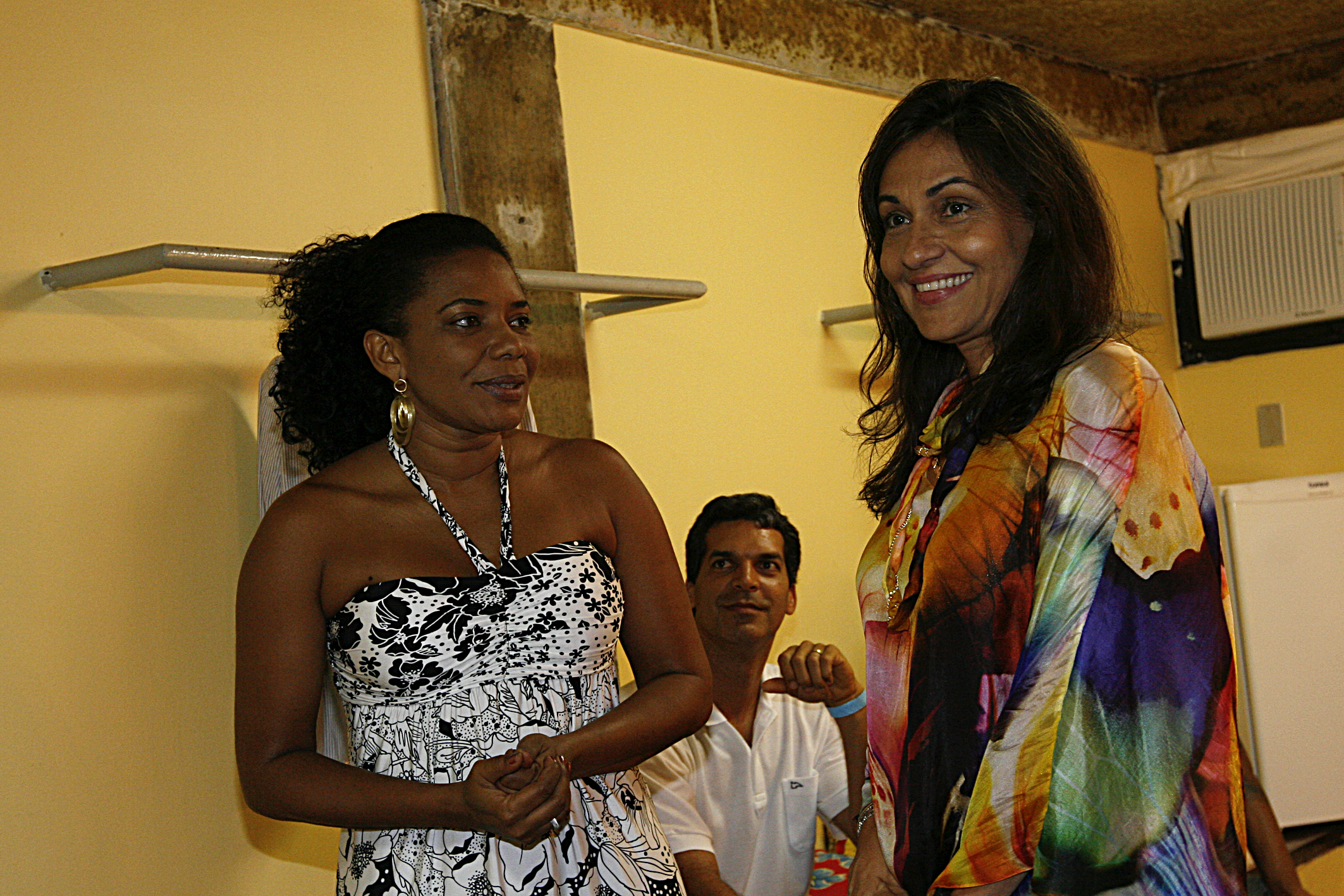 A cantora brasileira Margareth Menezes e a primeira-dama Fátima Mendonça